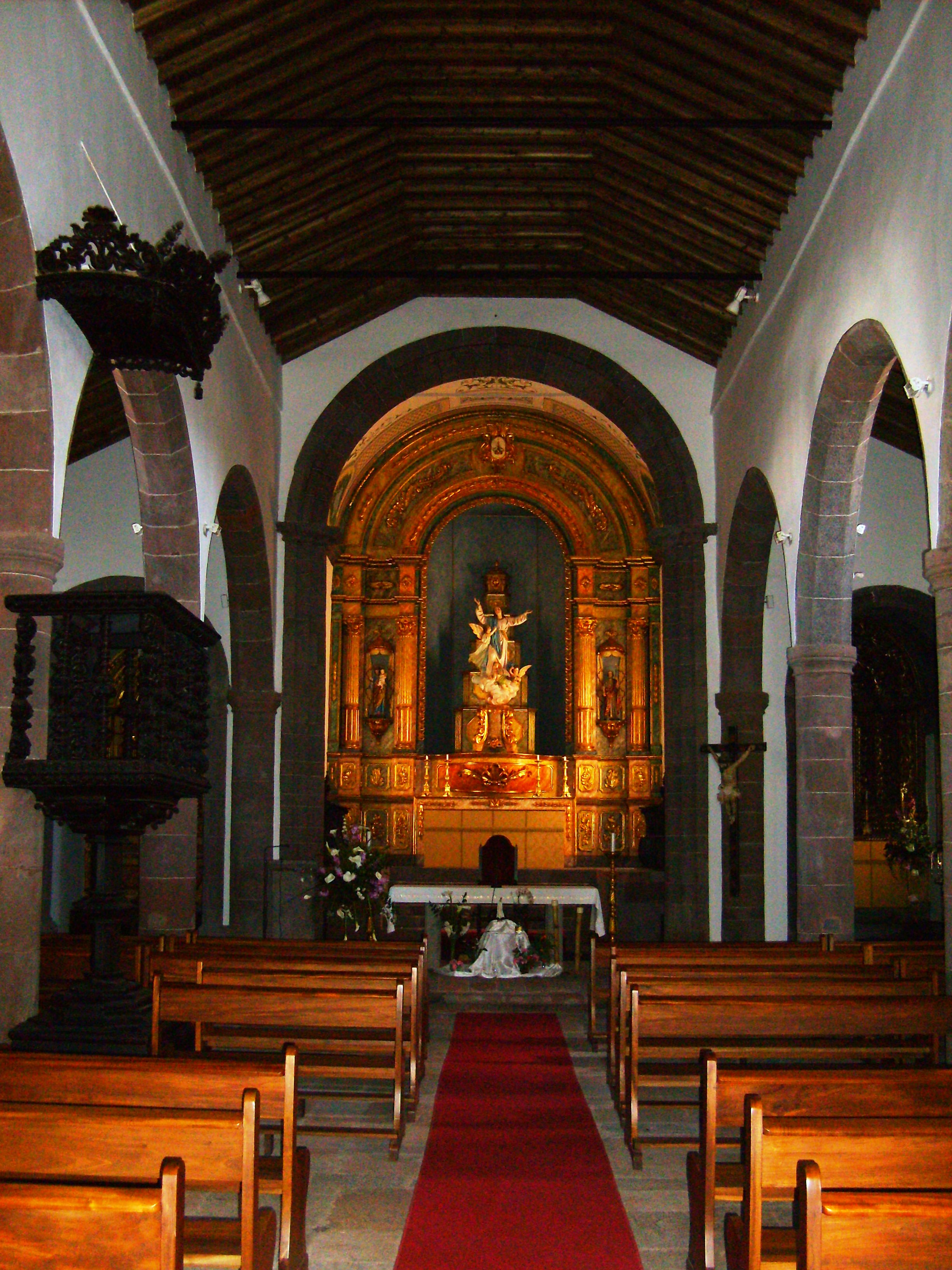 Igreja Matriz de Nossa Senhora da Assunção, Vila do Porto, Ilha de Santa Maria (Açores), Portugal.